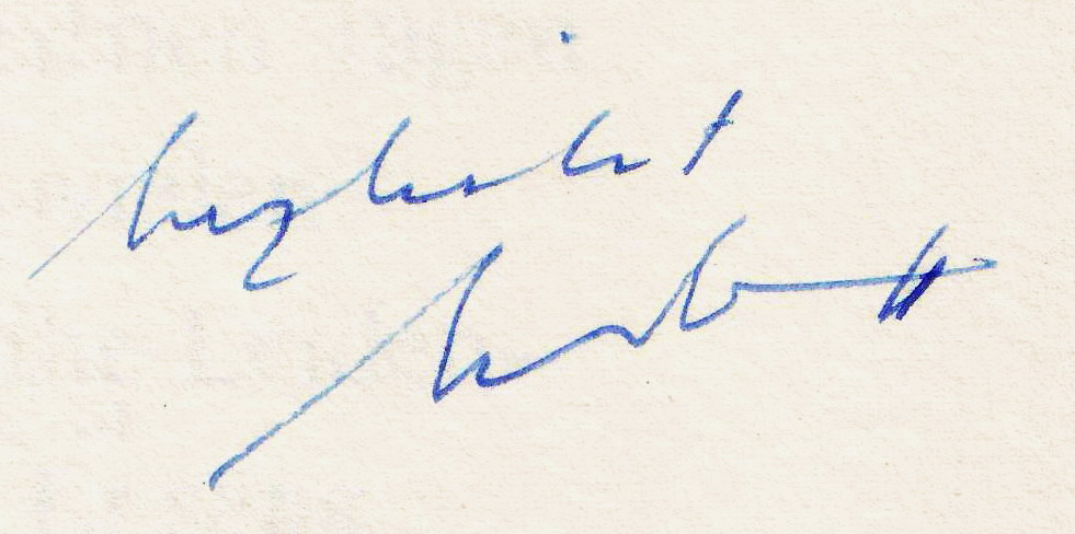 Widmung Hartmut Urban, Dezember 1992; Widmung des Buches: Alfred Kolleritsch, Hemler der Vogel - Mit Zeichnungen von Hartmut Urban, Literaturverlag Droschl, Graz 1992